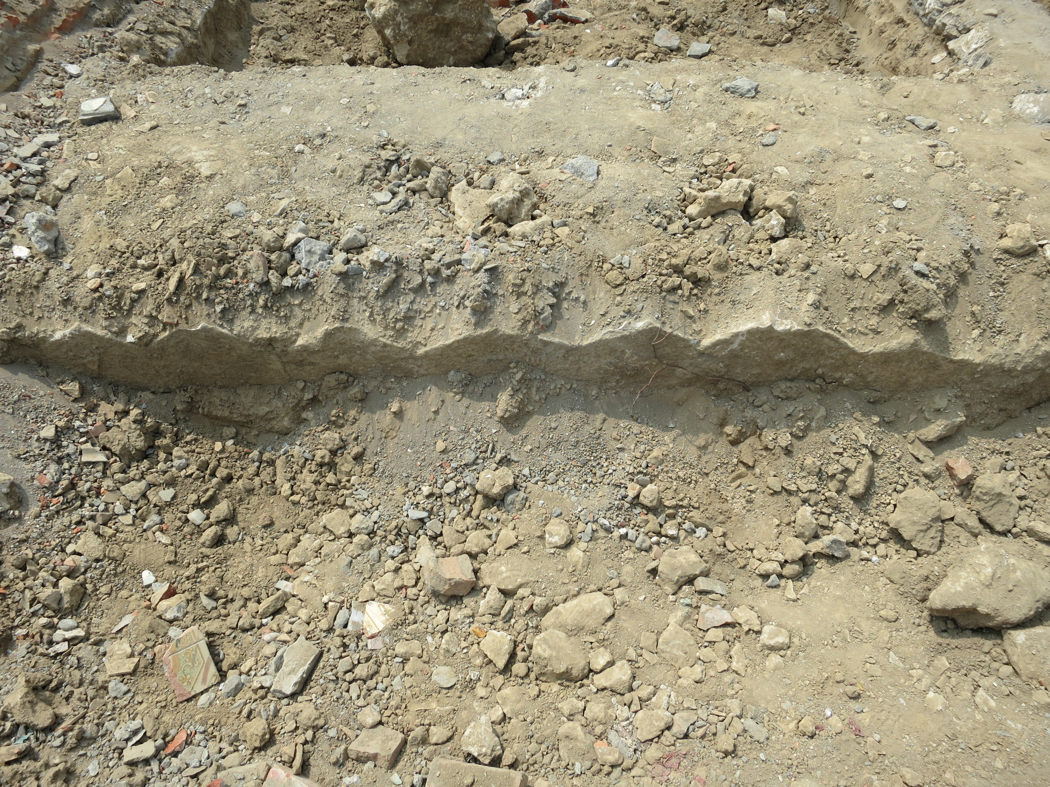 西門城門基座六角形咾咕石